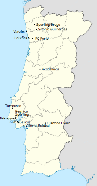 Carta dos clubes participantes do campeonato de portugal de futebol de primeira divisao 1964-1965